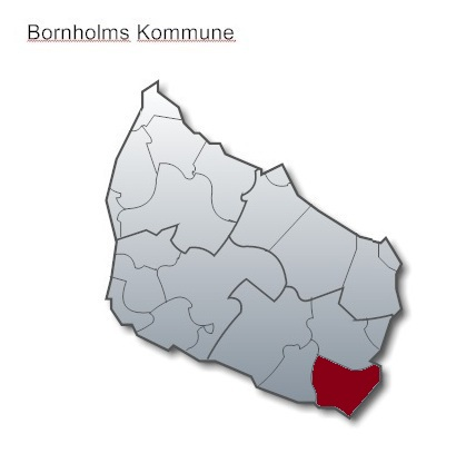 Poulsker Sogn